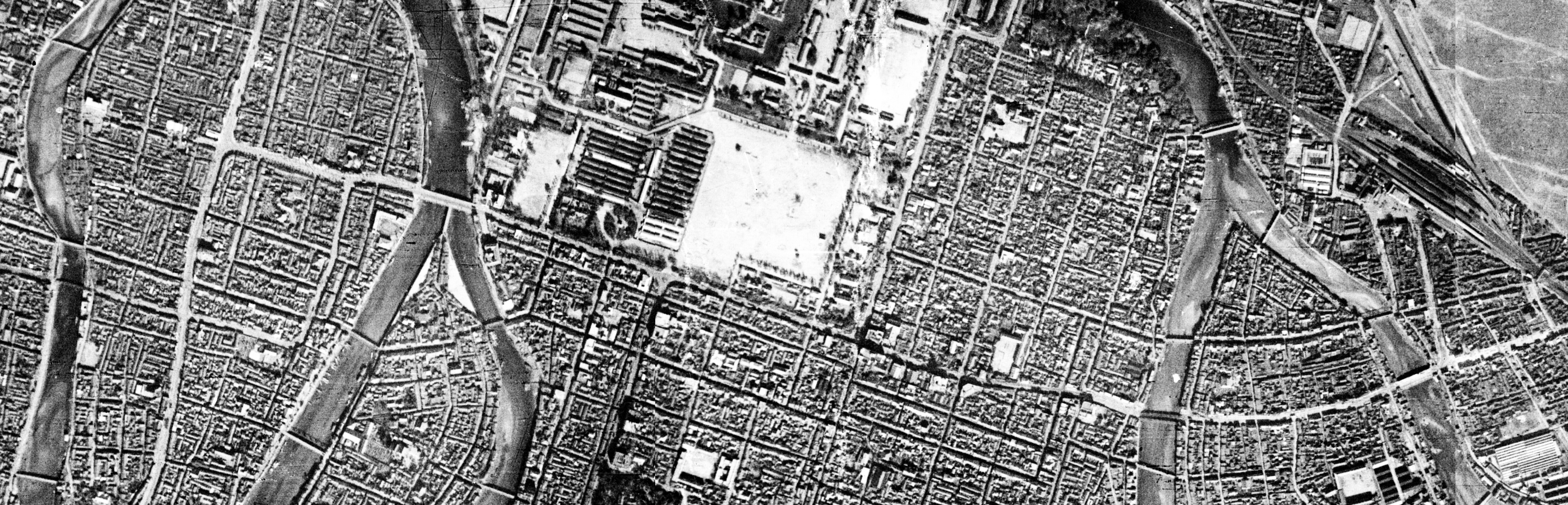 1939年広島市の相生通り周辺